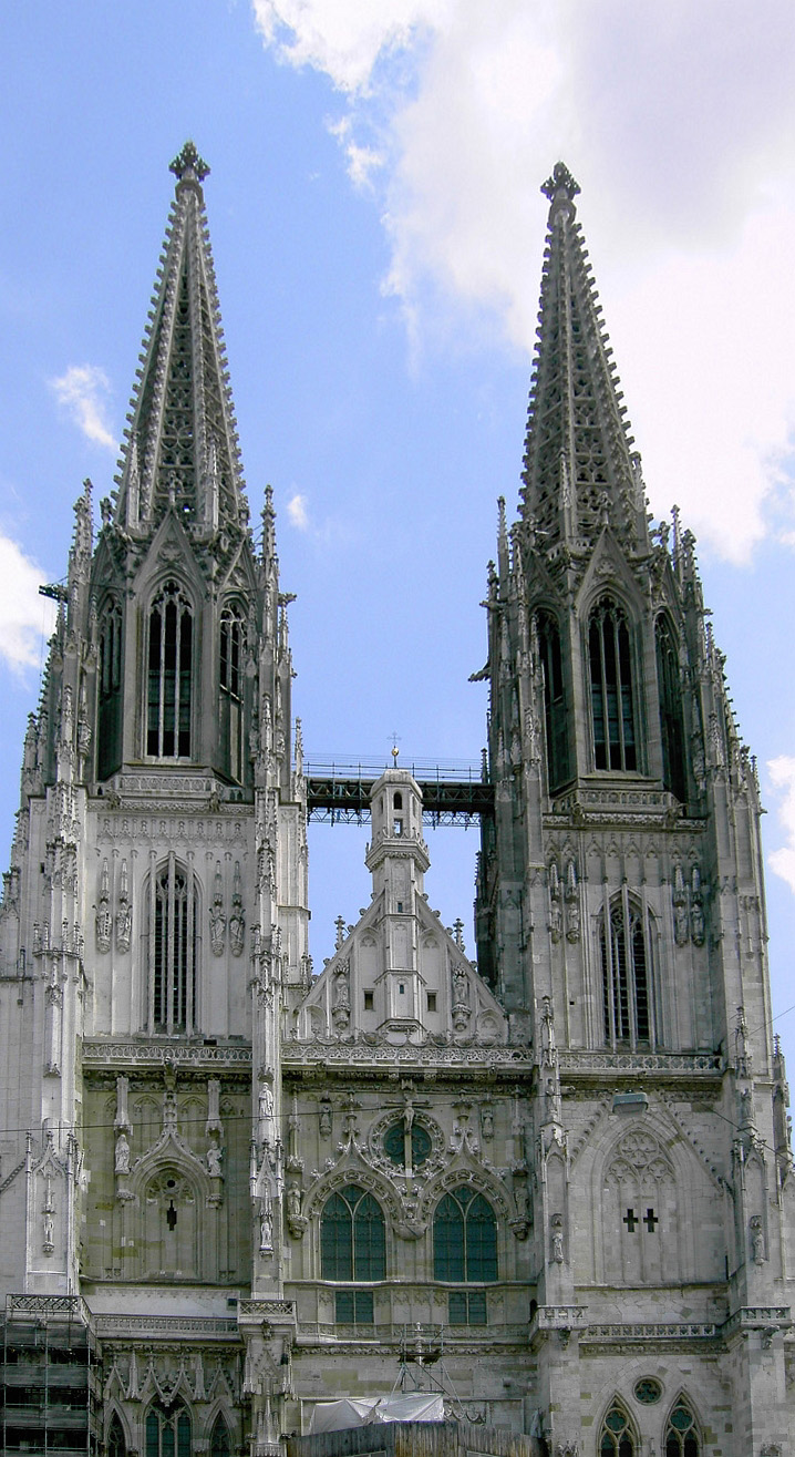 Regensburg Cathedral, West Side